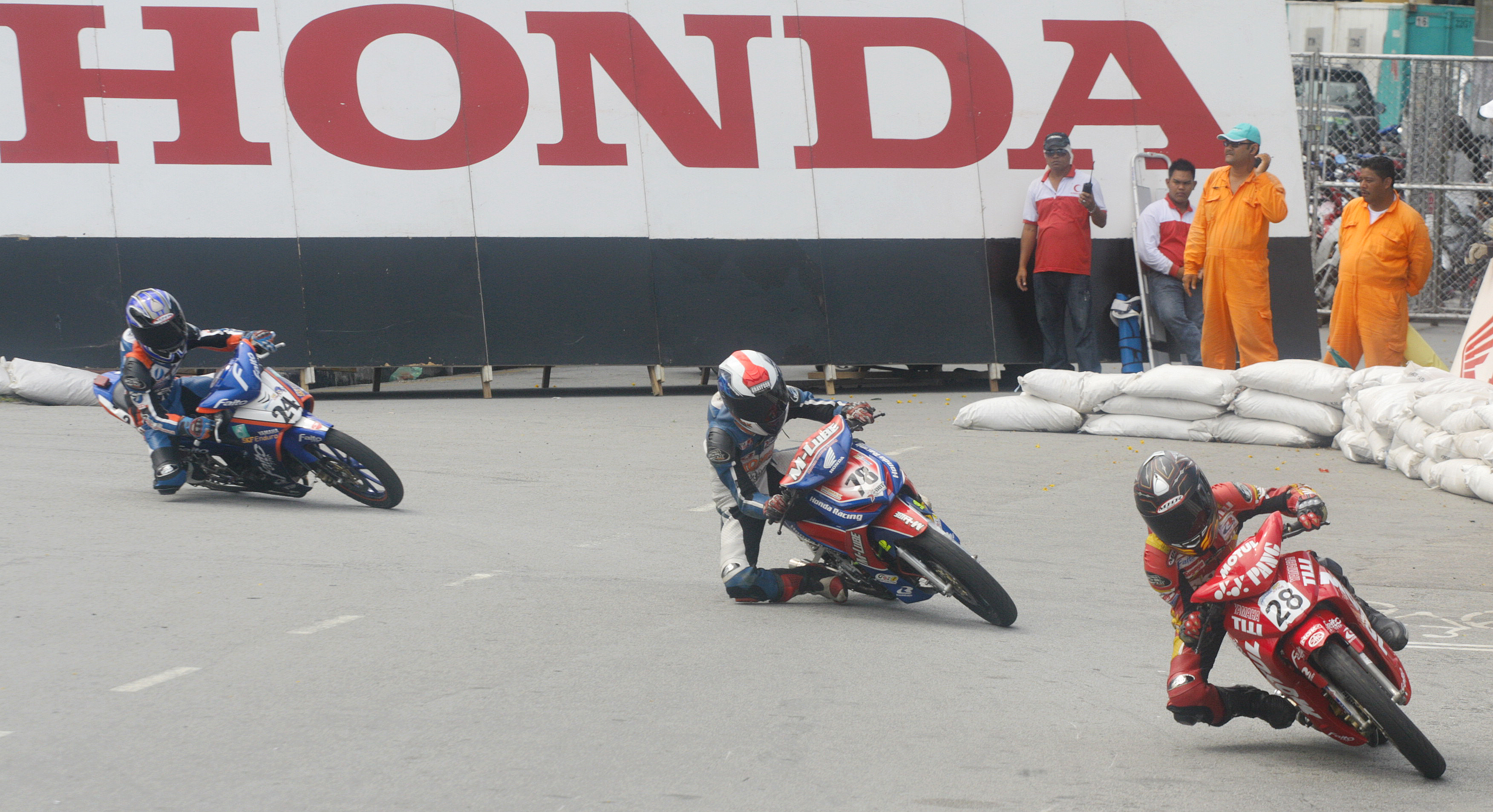 4 DEC 2011 - Perlumbaan Cub Prix 2011 di Pulau Penang.